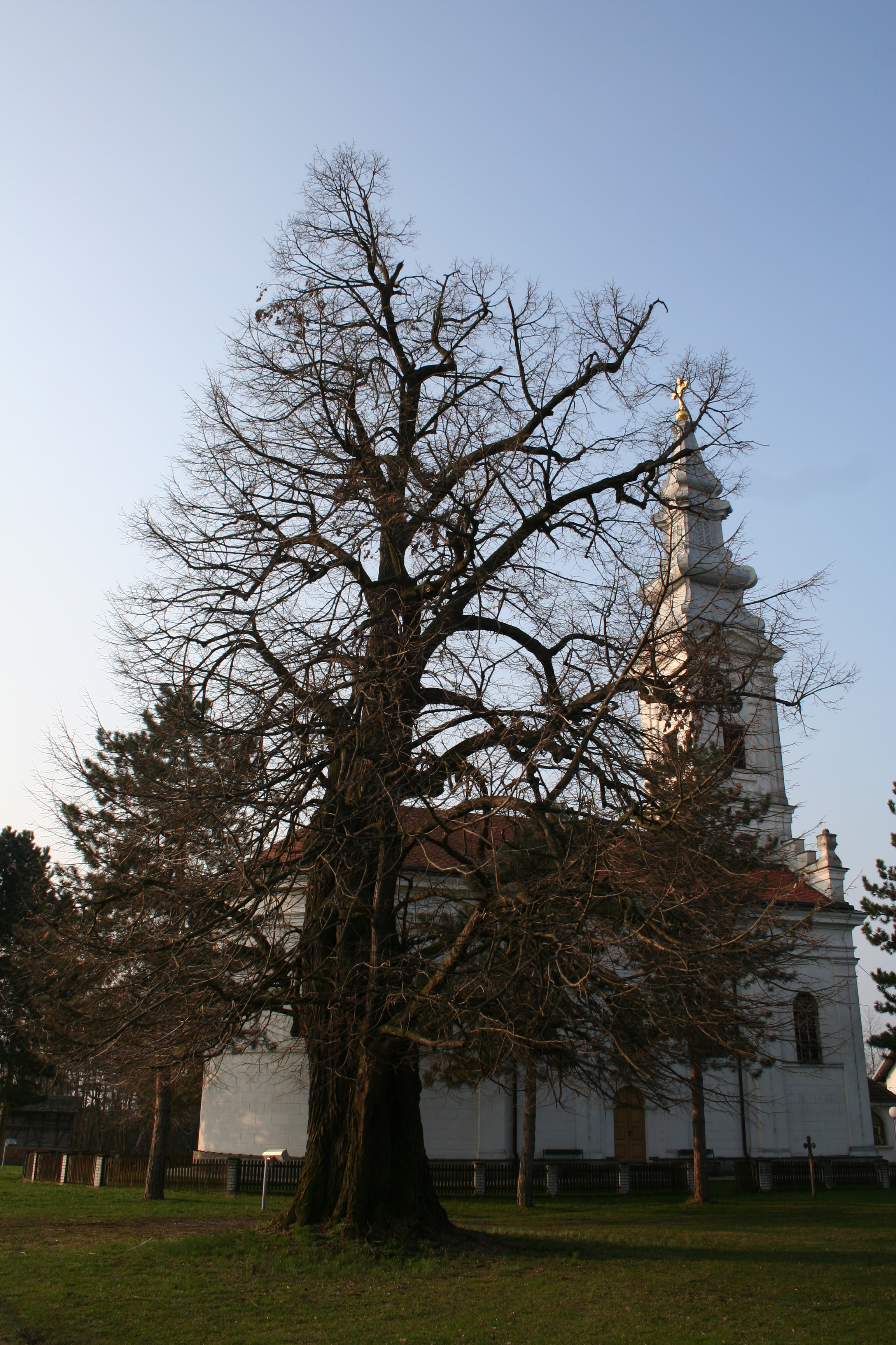 Crkva Sv. Nikole